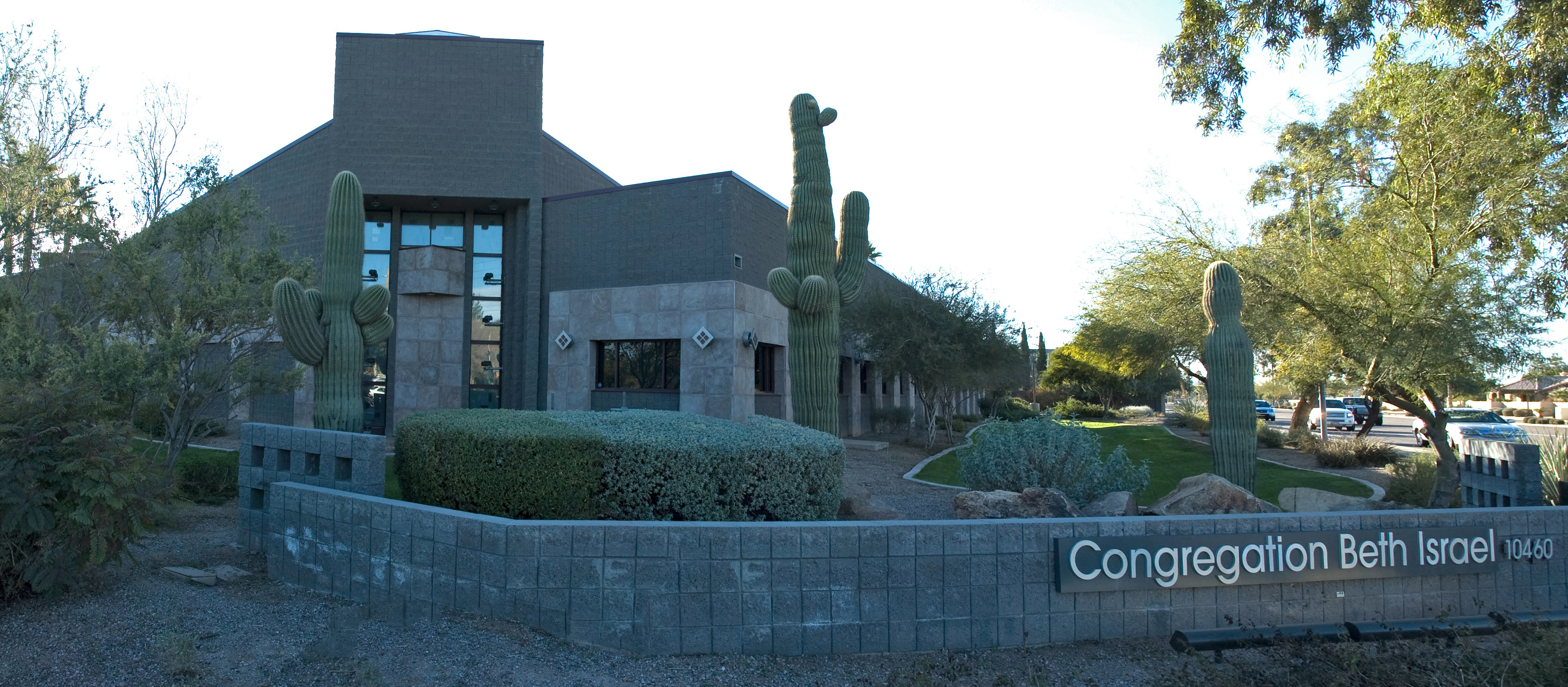 Congregation Beth Israel (Scottsdale, Arizona)